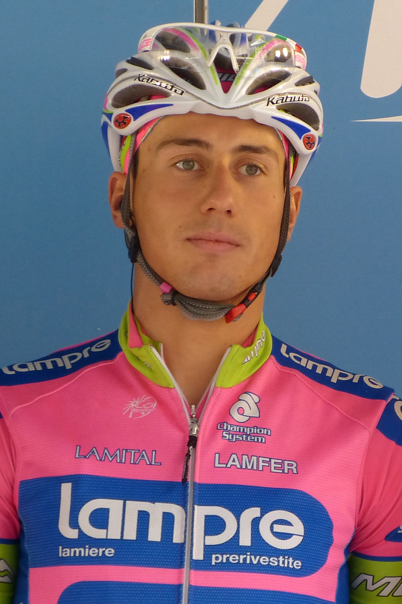 Vuelta al País Vasco 2013